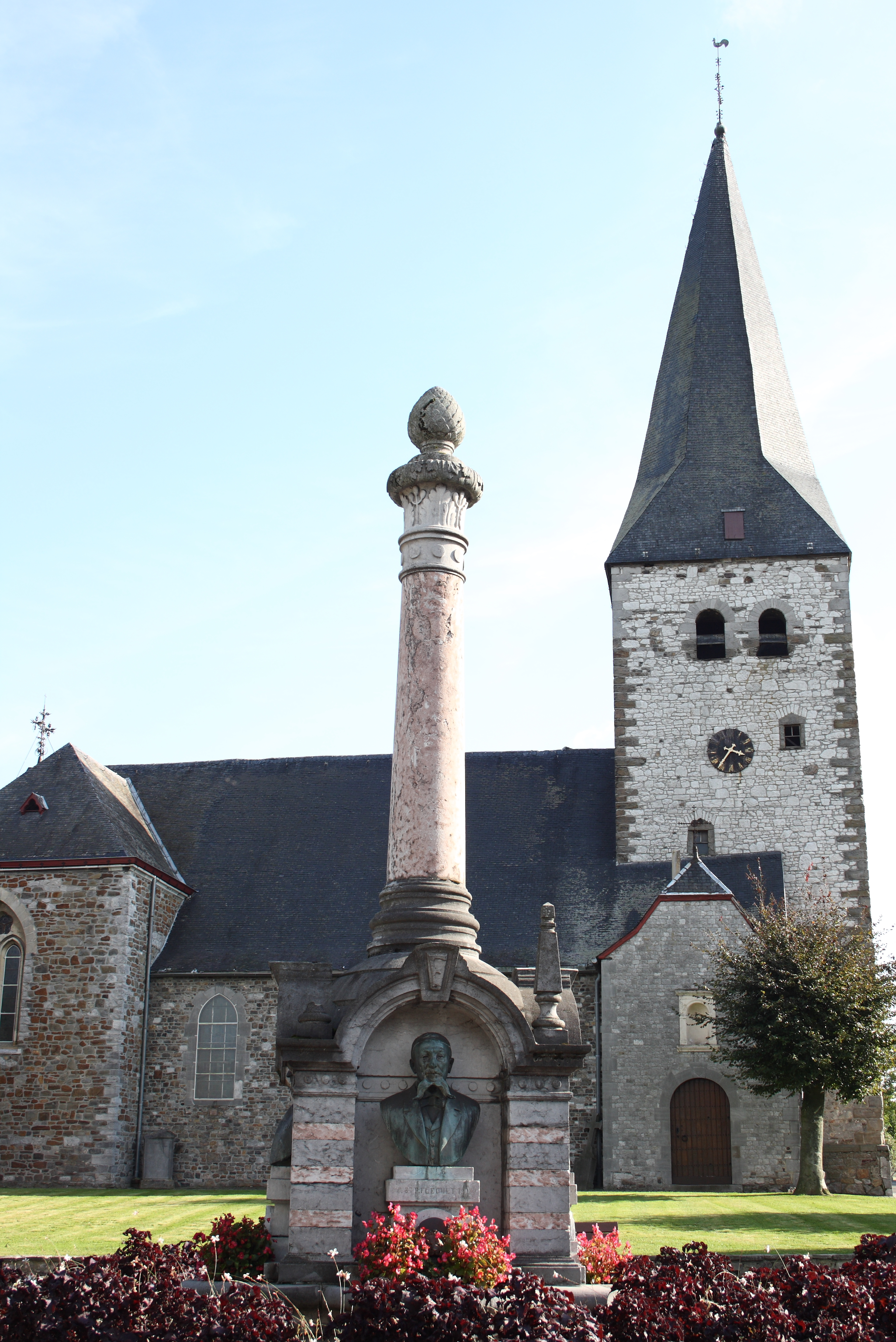 Denkmal in Warsage, einem Ortsteil von Dalhem in Belgien